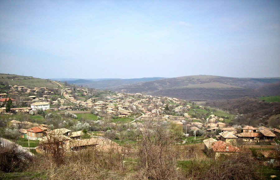 Село Конак, община Попово. Поглед от югоизток.